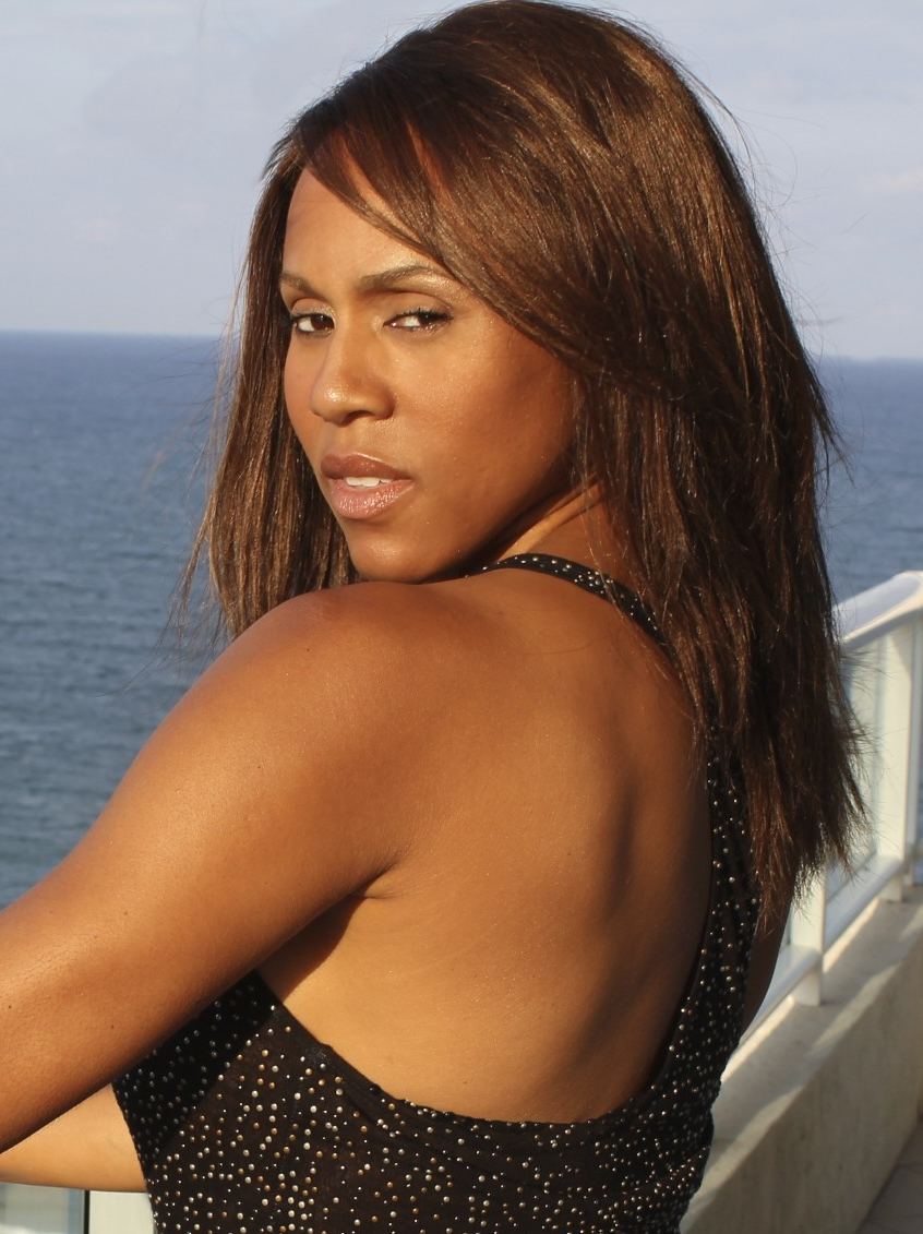 Deborah Cox in Miami.jpg